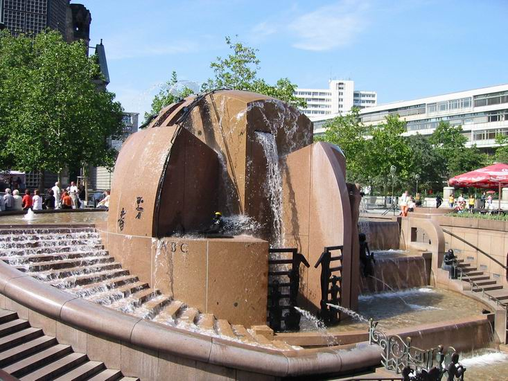 Erdkugelbrunnen am Breitscheidplatz, auch "Weltkugelbrunnen" oder "Wasserklops" genannt. Entworfen von Joachim Schmettau, gebaut 1982 bis 1984. Beton, Bronze, roter Granit, Höhe ca. 10 m, ø 17 m; mit zahlreichen Bronzefiguren.